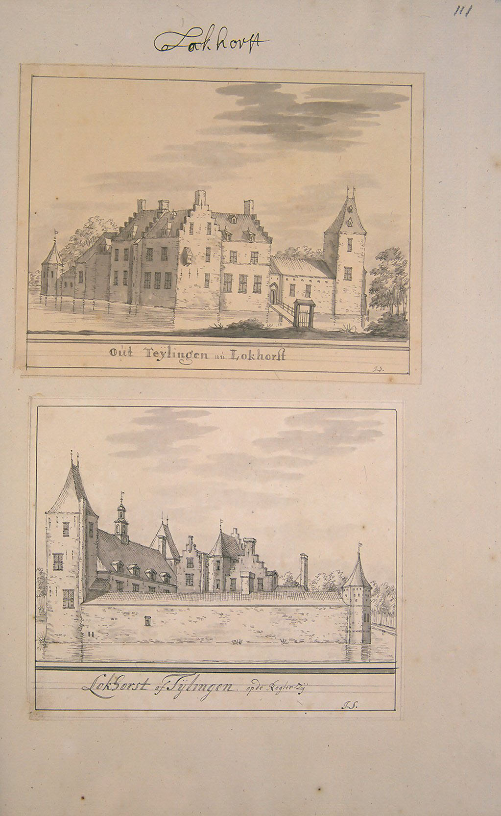 Beschrijving en Afbeelding der Steeden Dorpen Gehugten Aadelijke En Andere Gebouwen In Zuijt Holland en Aankleving van Dien Meest naat leeven getekeent. en Naat A.B.C. gelegt Dus Beschreeven en bij een Versaamelt Door Andries Schoemaker 1730